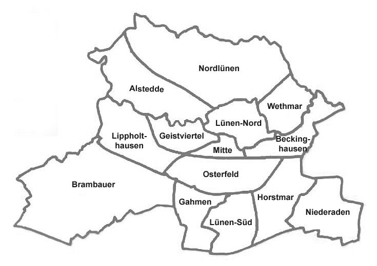 Schematische Darstellung der Stadtteile/statistischen Bezirke von Lünen